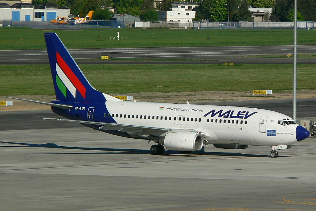 reg.: HA-LOL